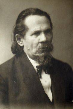 Каллистра́т Фалалеевич Жаков (1866—1926) — коми-зырянский этнограф, философ, писатель.